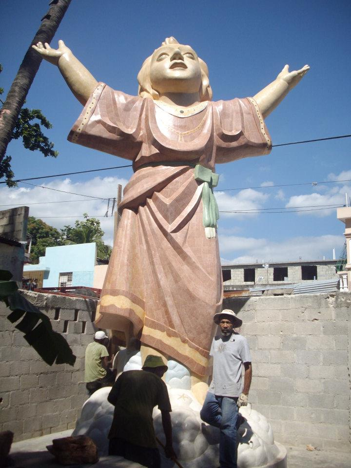 El artista, Ramon Osorio, junto a su obra, seguramente la reproducción más grande del mundo del Divino Niño